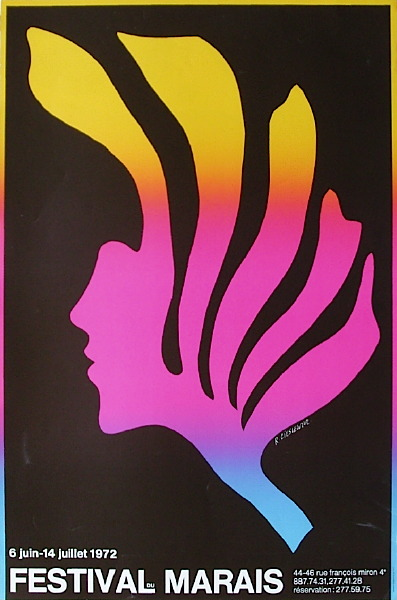 Affiche du festival (6 juin - 14 juillet 1972)